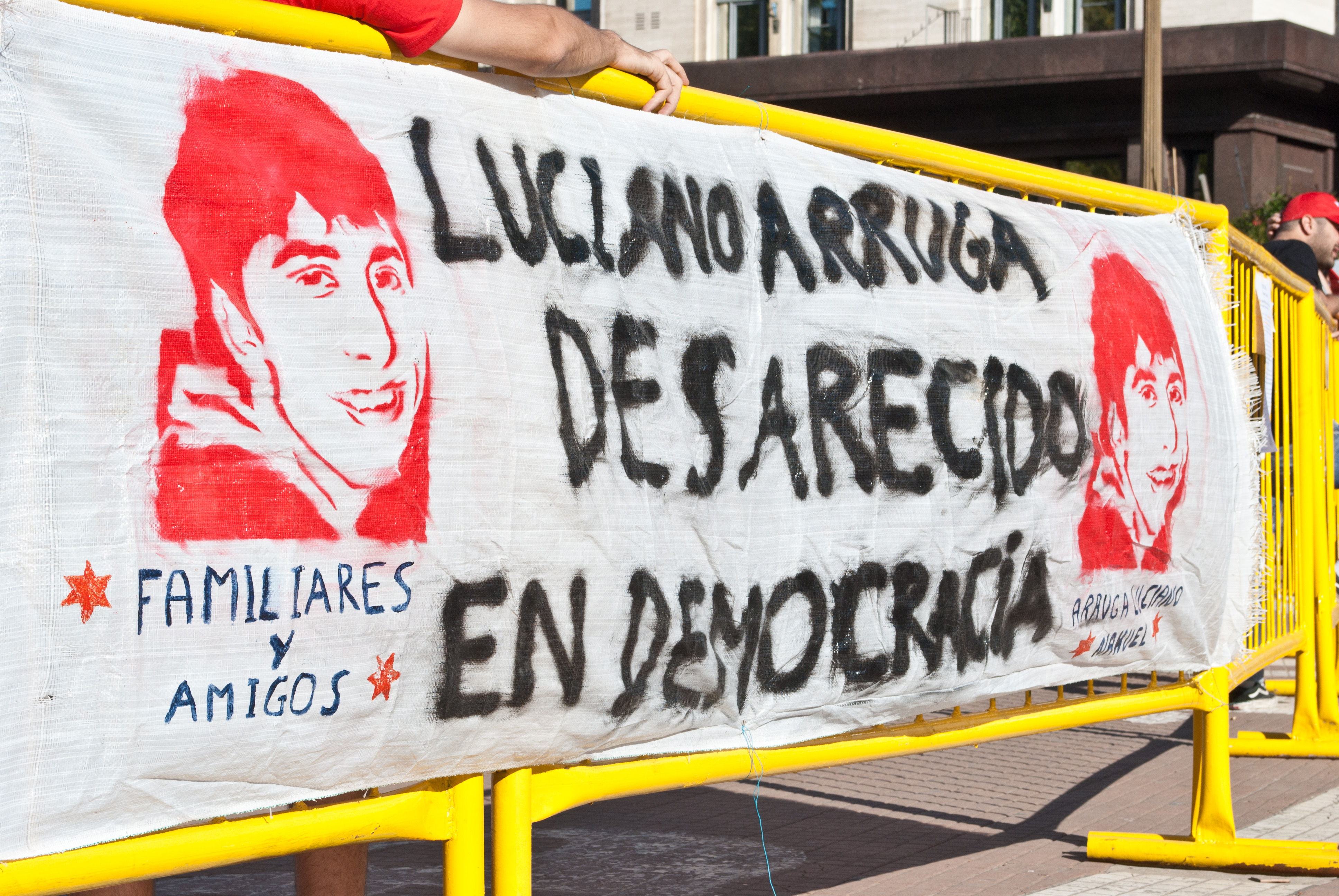 24 de Marzo, Día Nacional de la Memoria por la Verdad y la Justicia - Buenos Aires, Argentina - Marzo 2012